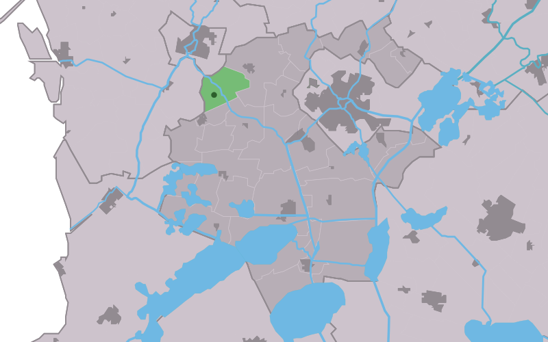 Kaartsje fan himrik fan Wolsum